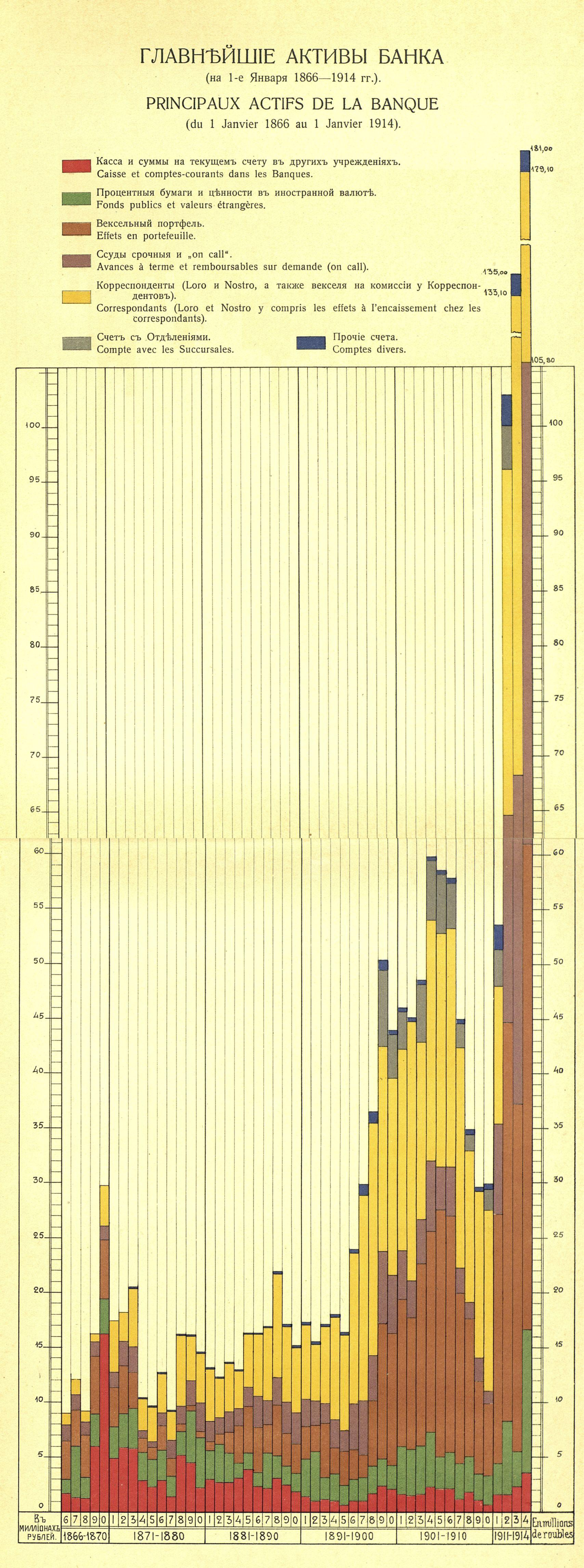 Активы Санкт-Петербургского частного коммерческого банка, 1864-1914